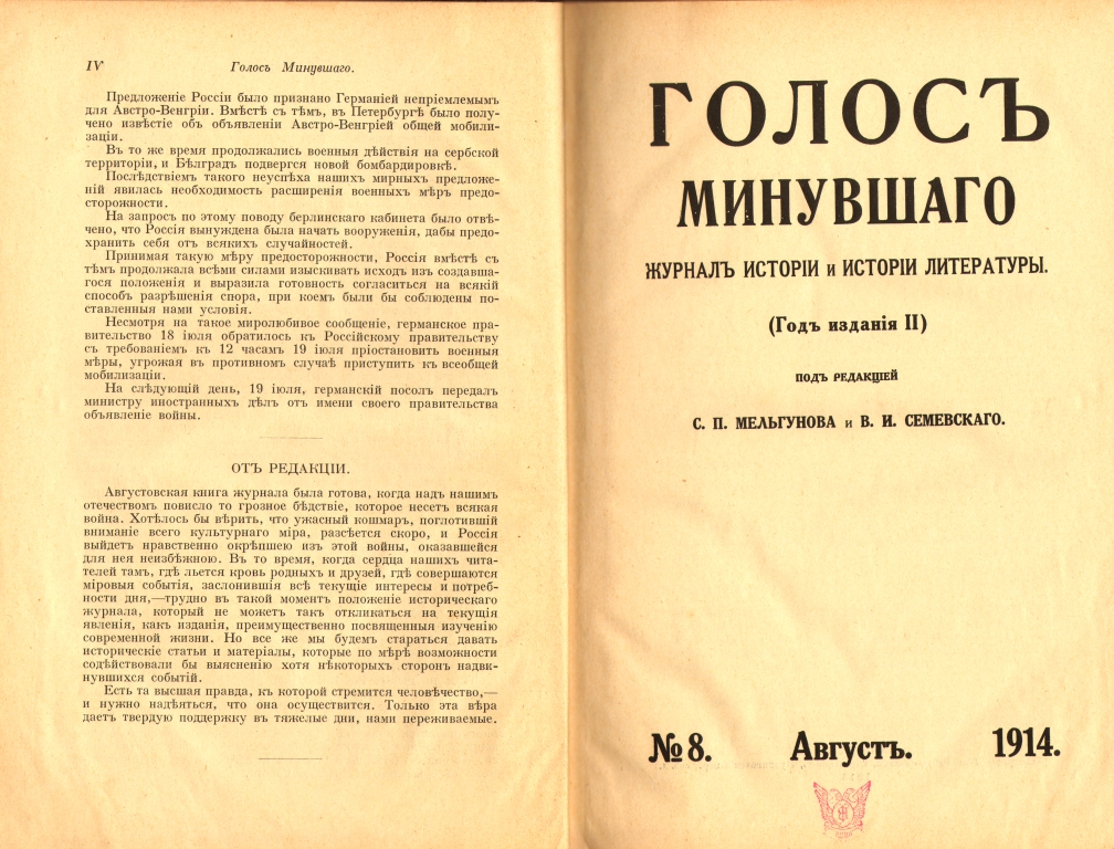 Голос минувшего. The title page of journal "Golos minuvshego"